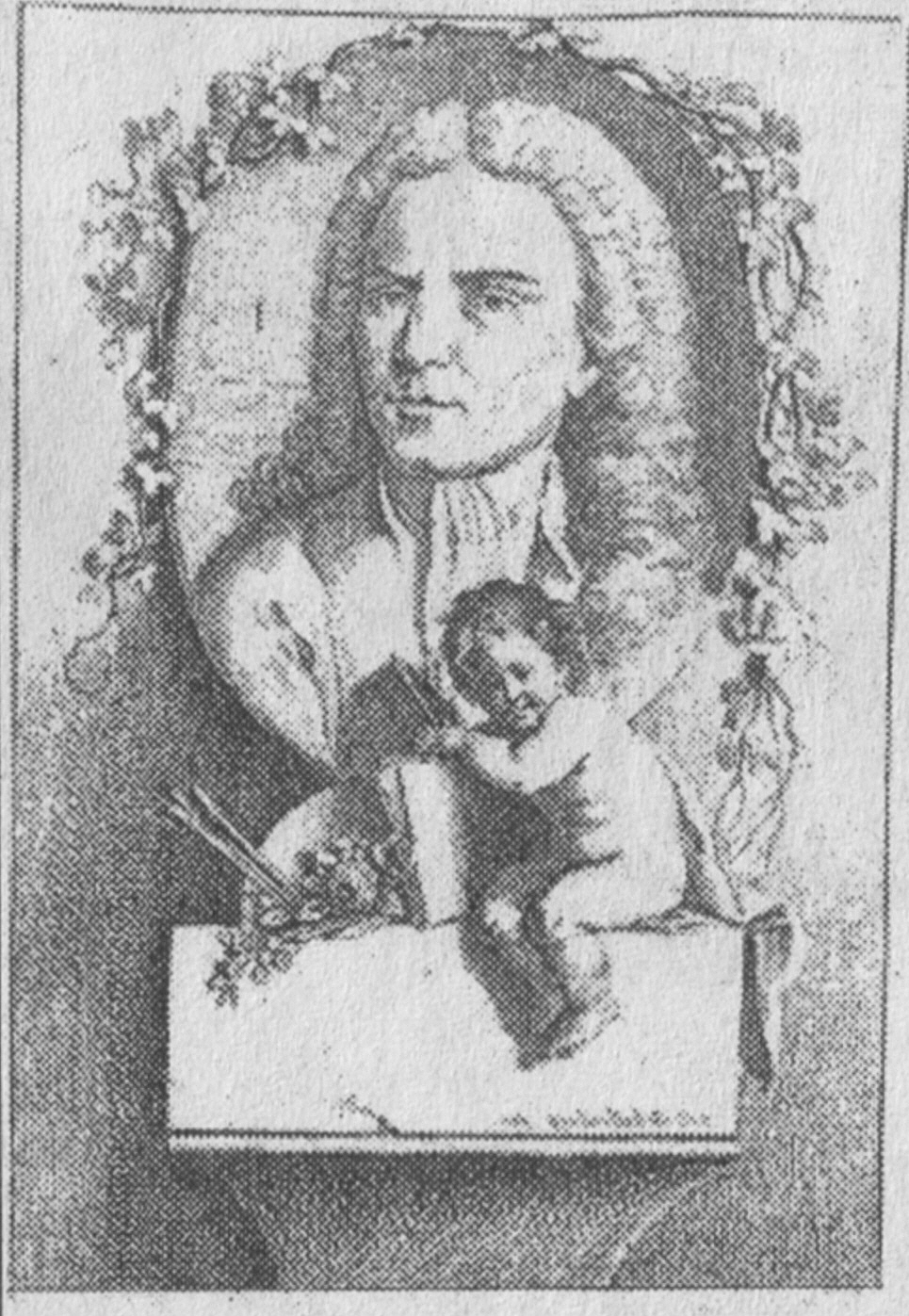 Portrait des Schweizer Kunstmalers Giovanni Battista Innocenzo Colomba (auch Colombo) (1717-1793).